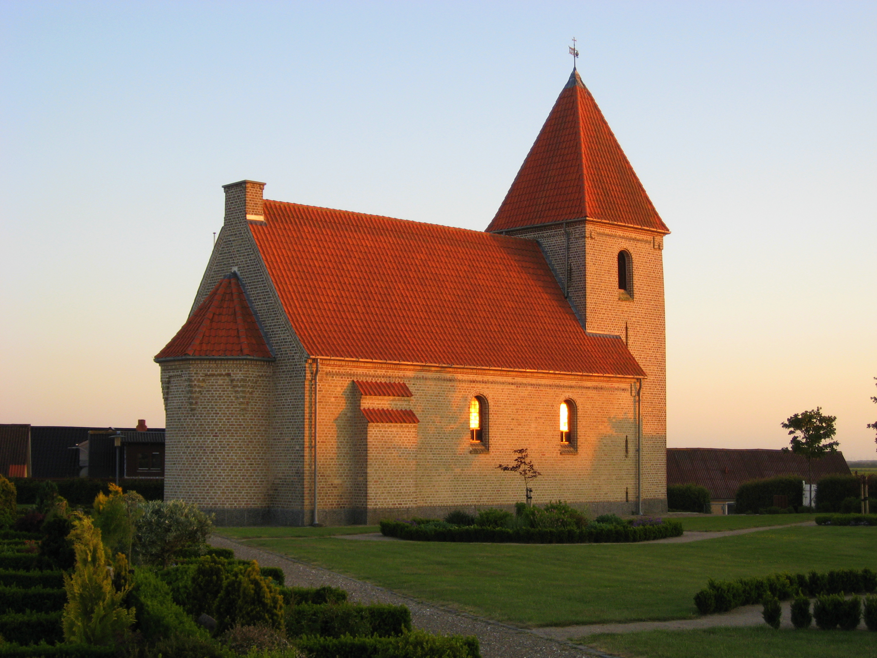 Øster Hjermitslev Kirke, Brønderslev Kommune